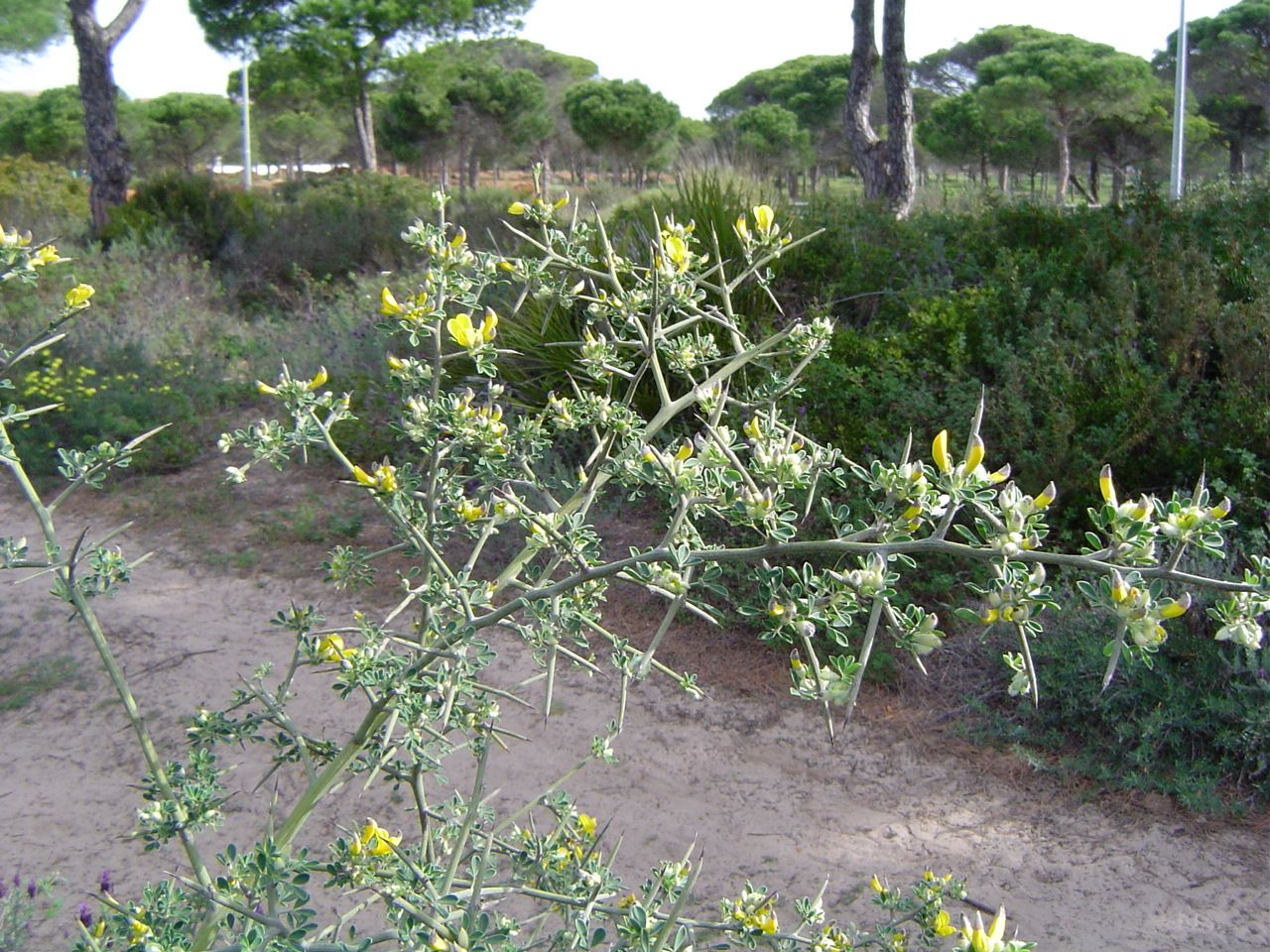 Herguen, Calicotome villosa, Costa de Cádiz, España